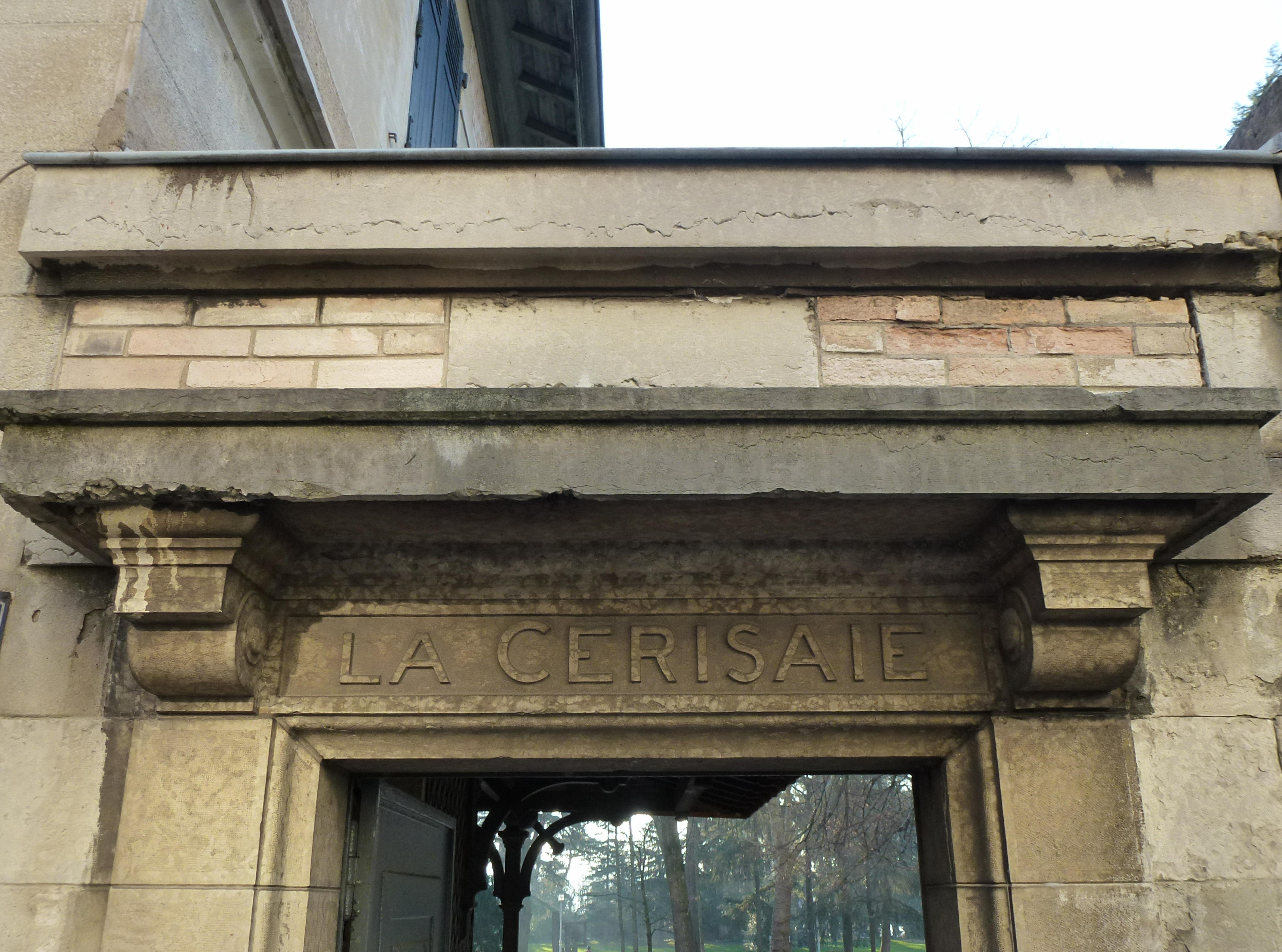 Parc de la Cerisaie à Lyon (4ème) - Détail de l'entrée rue Chazière.